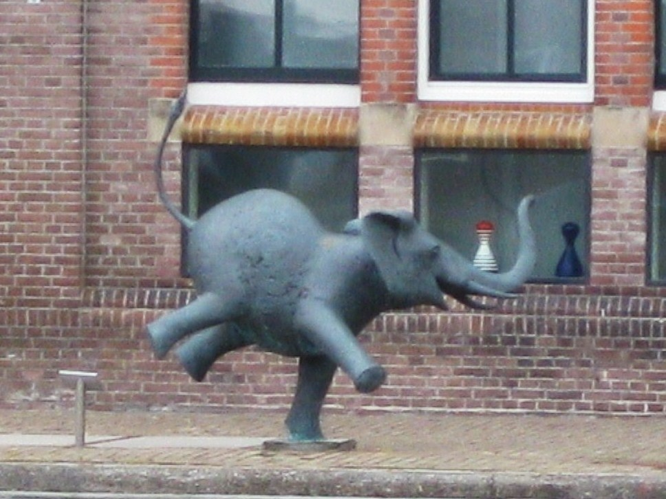 Olifant voor het kantoor van Jumbo Spellenfabriek in de Verkadefabriek aan de Zaan.2006